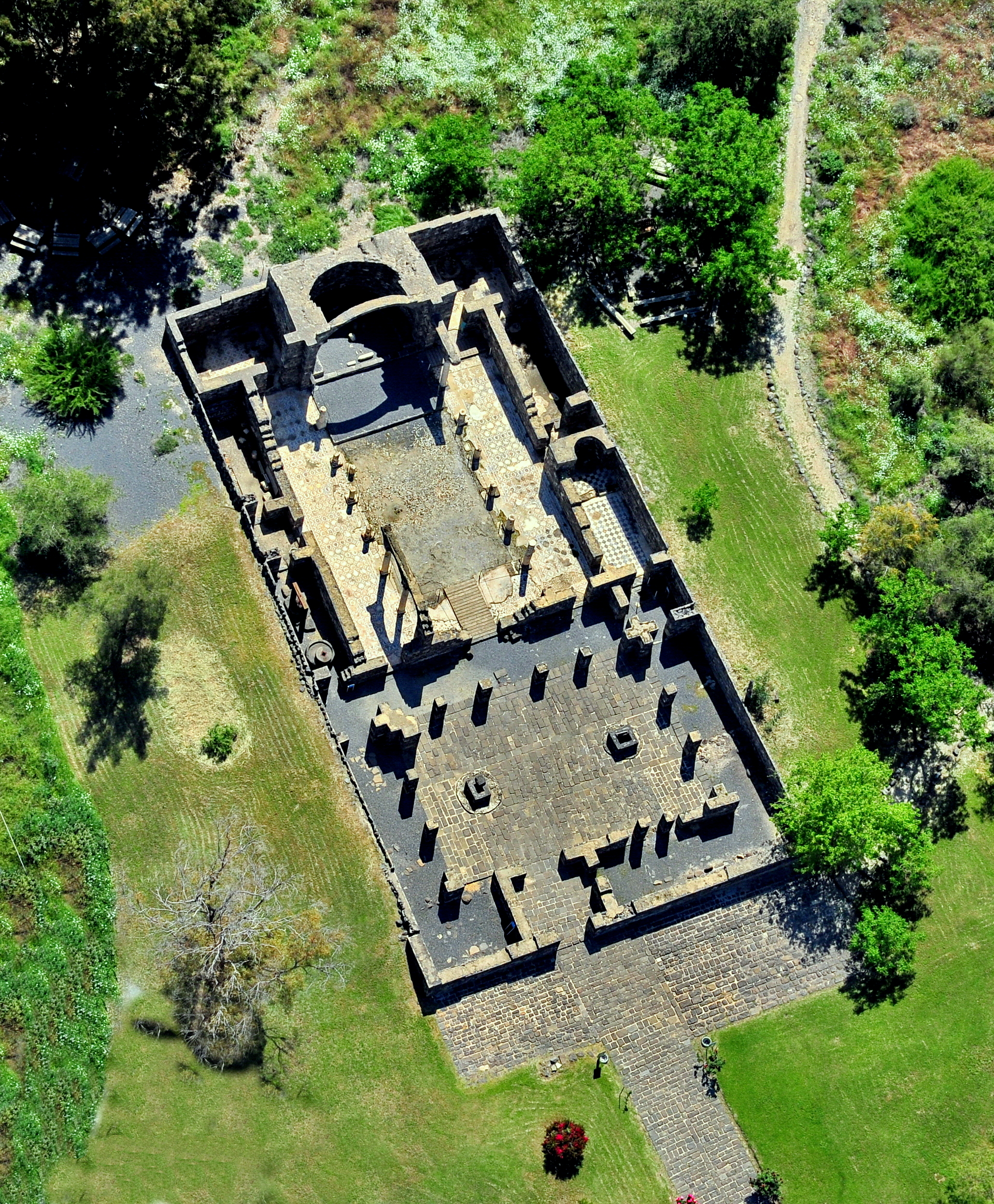 אתר ארכאולוגי לחופה המזרחי של הכנרת, ובו שרידיו של מנזר נוצרי, המתוארך למחצית המאה ה-5 לספירה. על פי המסורת הנוצרית מזוהה האתר עם מקום התרחשותו של "נס החזירים" שביצע ישו.